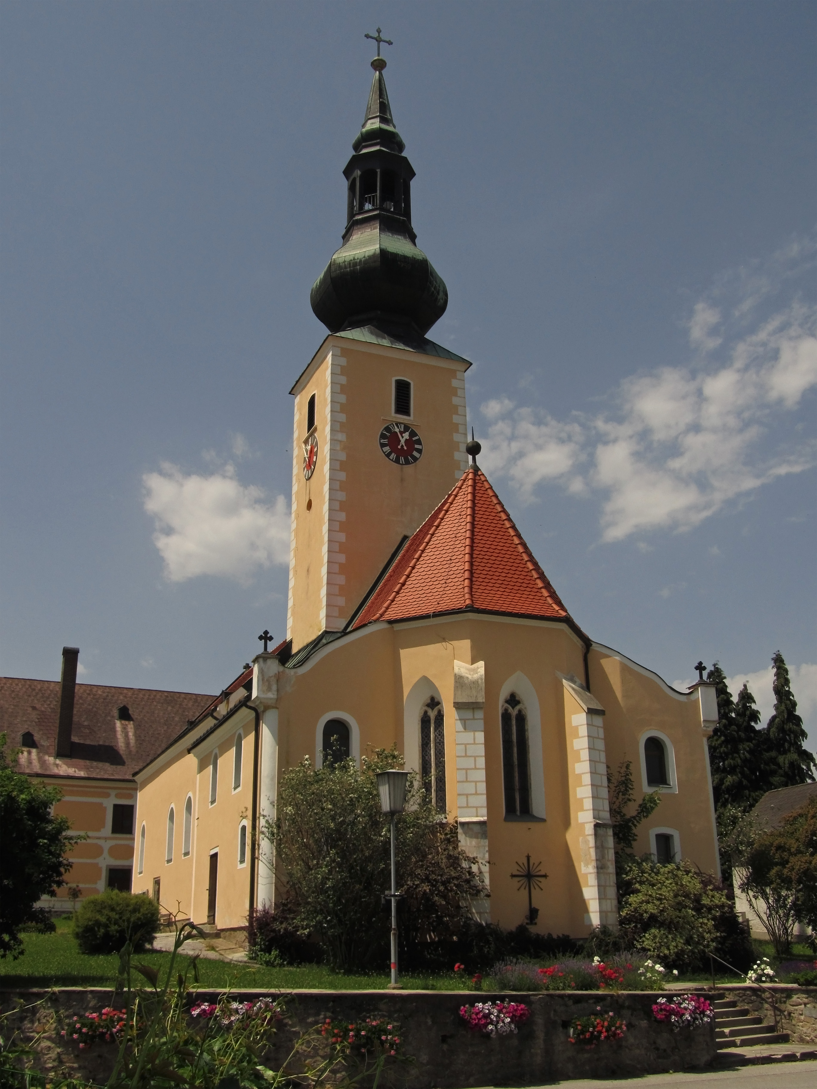 Die ursprünglich romanische Kirche wurde im 15. Jahrhundert durch einen spätgotischen Chor und den Einbau einer Halle verändert. Das Altarblatt am spätbarocken Hochaltar stammt von Martin Johann Schmidt.